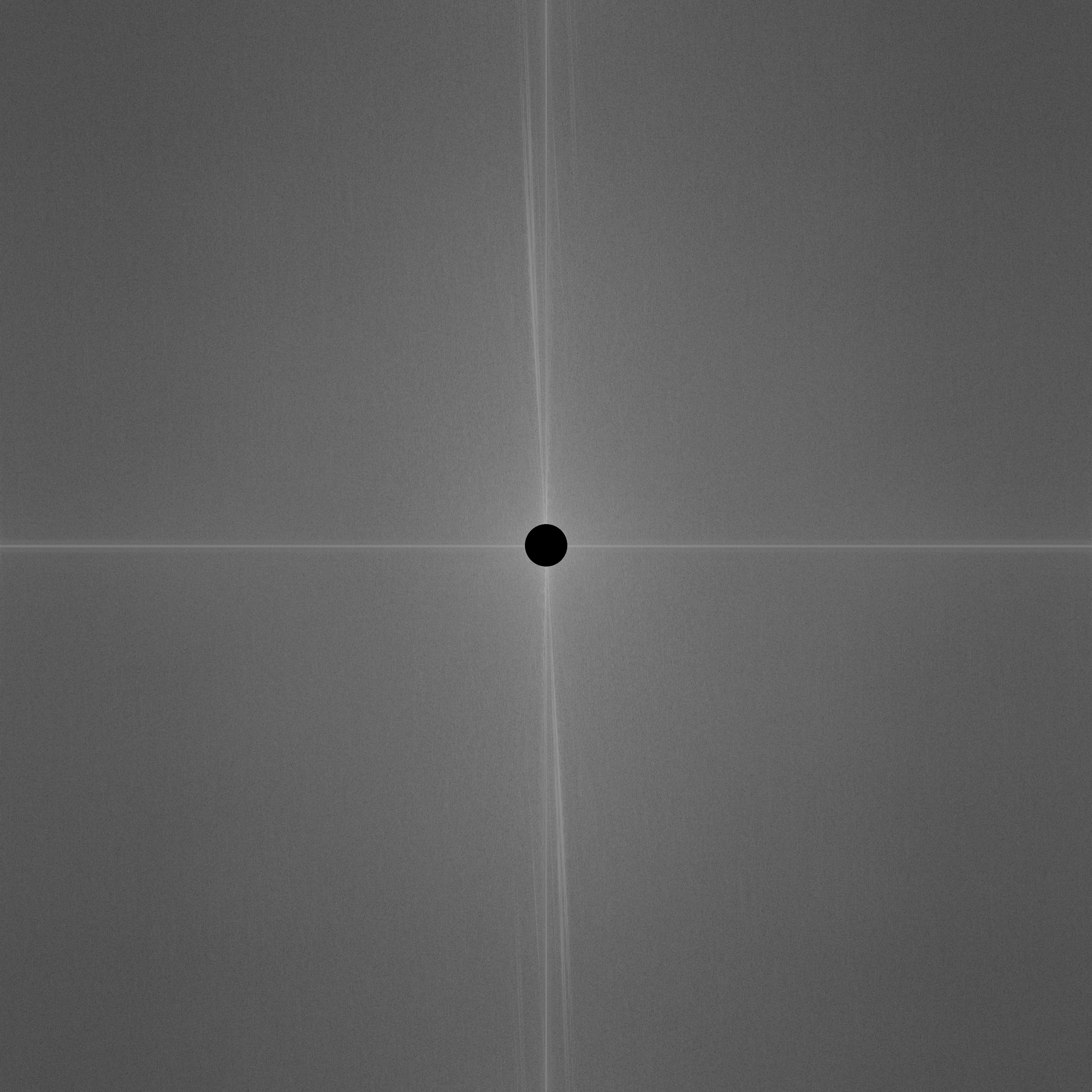 Transformada de Fourier eliminando las componentes de baja frecuencia